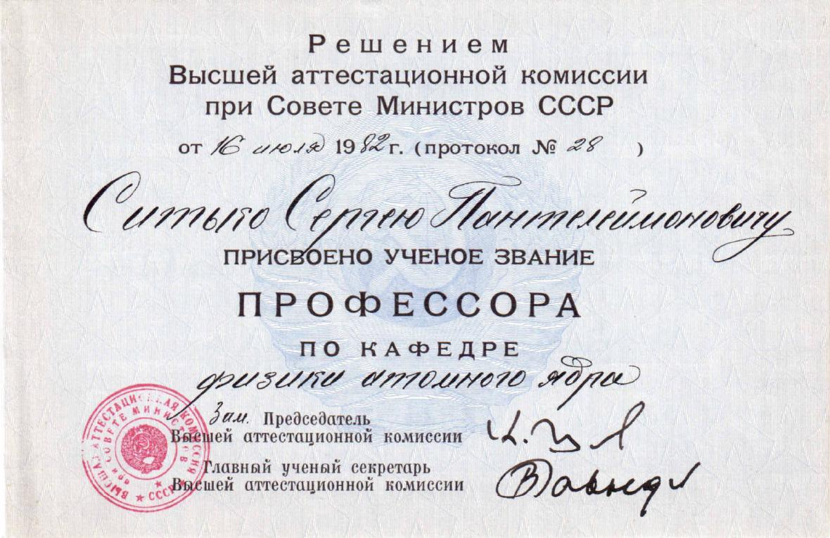 Решение Высшей аттестационной комисси о присуждении Ситько С.П. ученой степени профессора